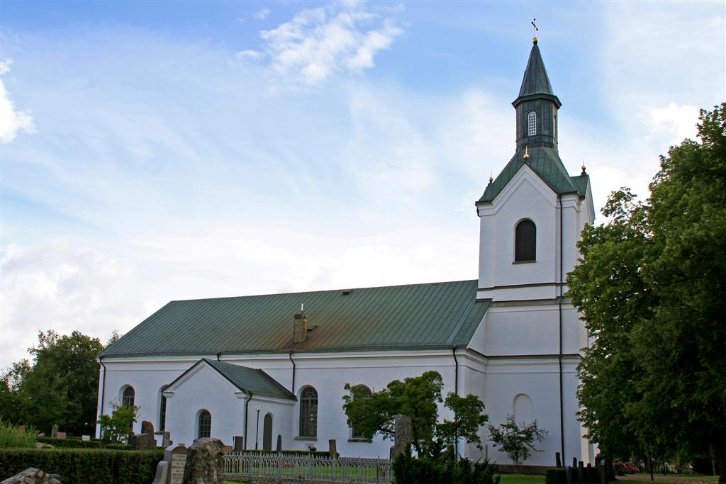 Foto: Tor Svensson